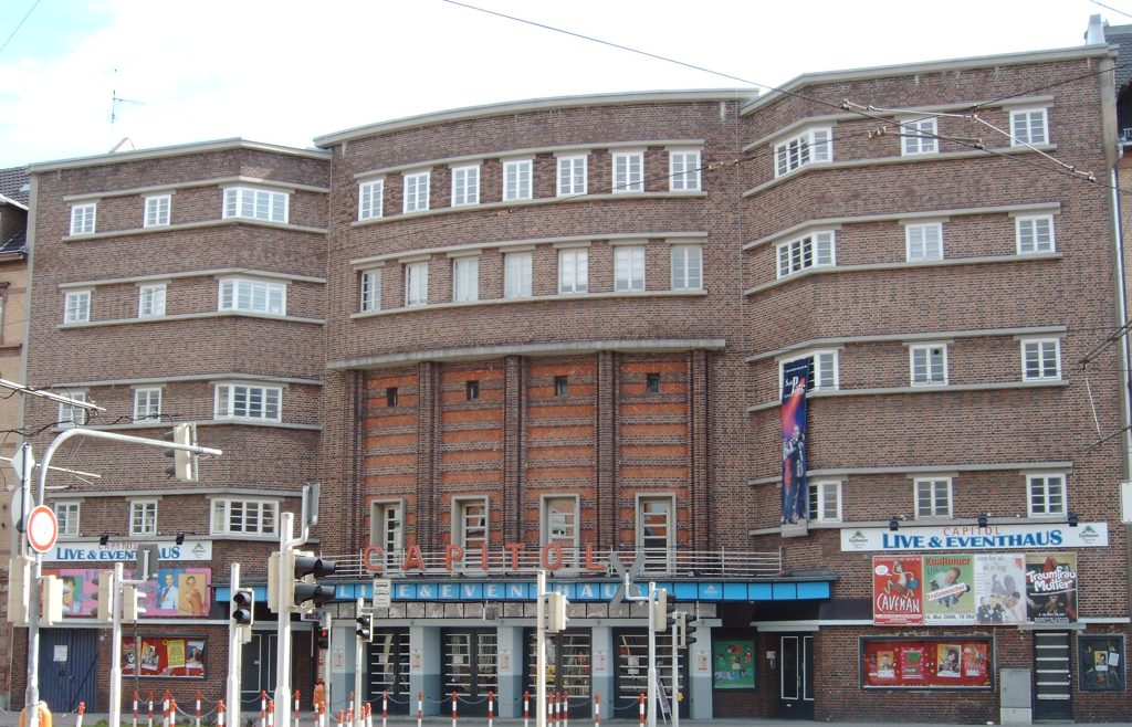 Capitol in Mannheim